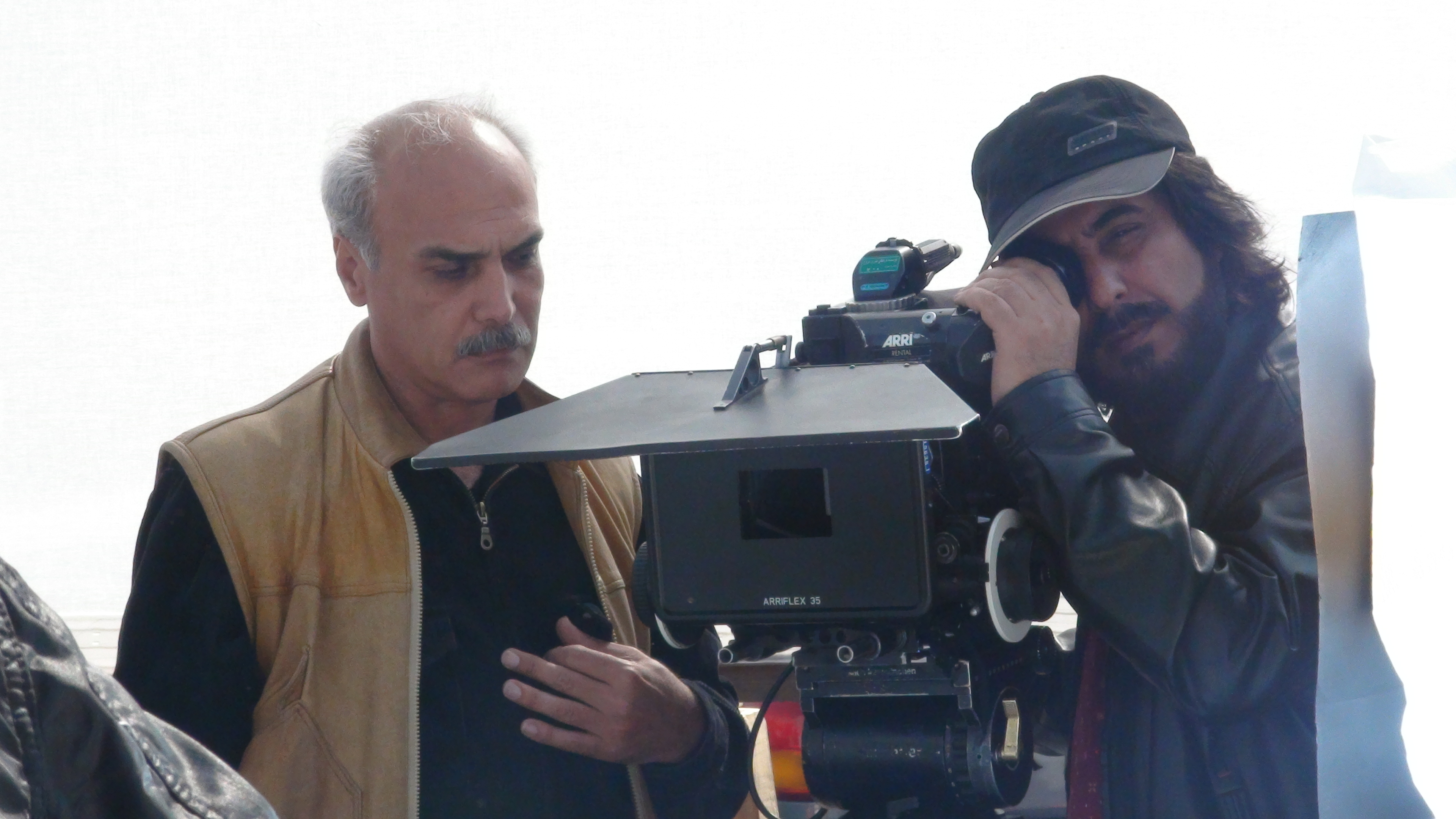 پشت صحنه فیلم بدون اجازه